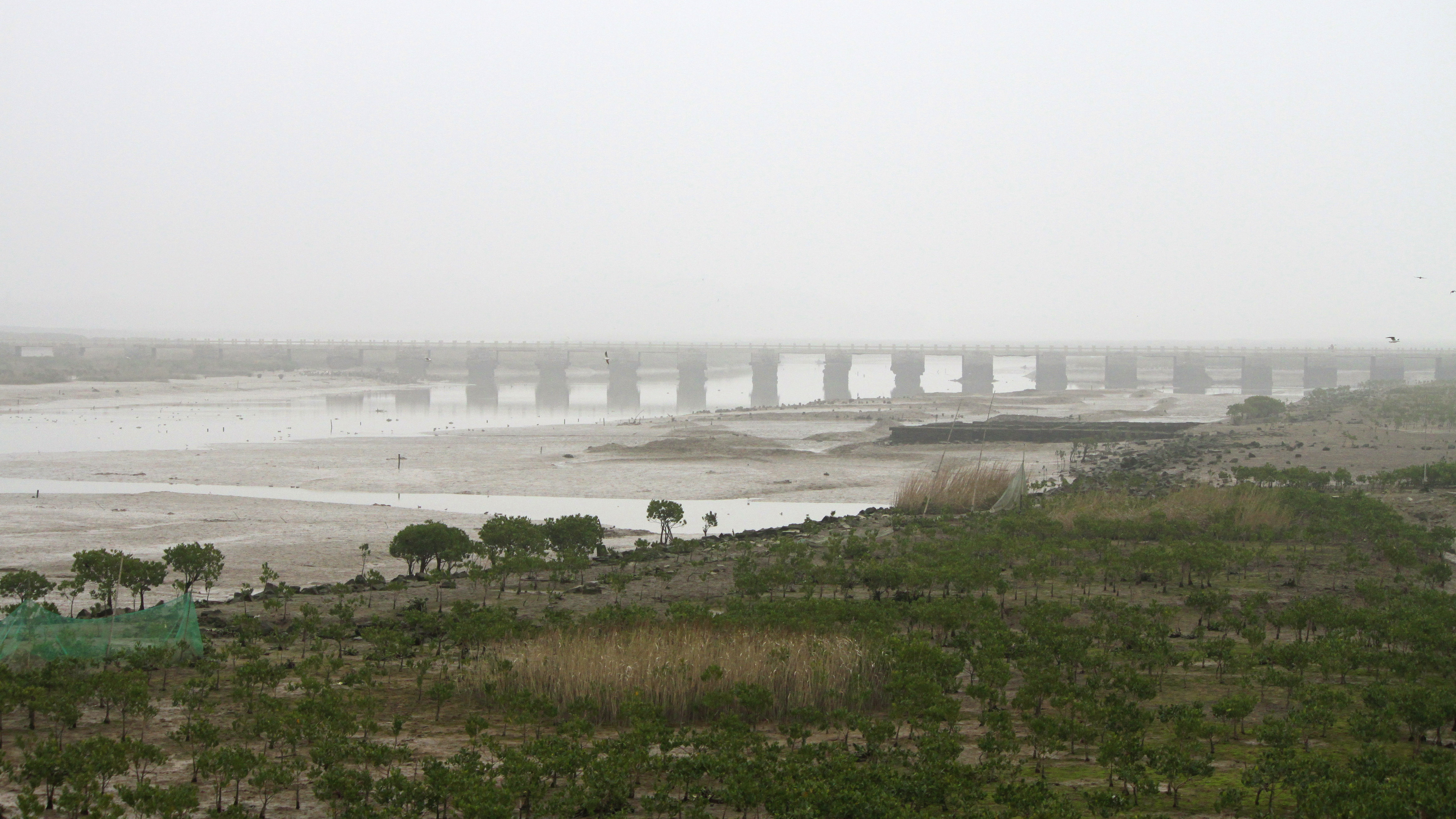 洛阳桥，位于中国福建省泉州市，是全国重点文物保护单位。